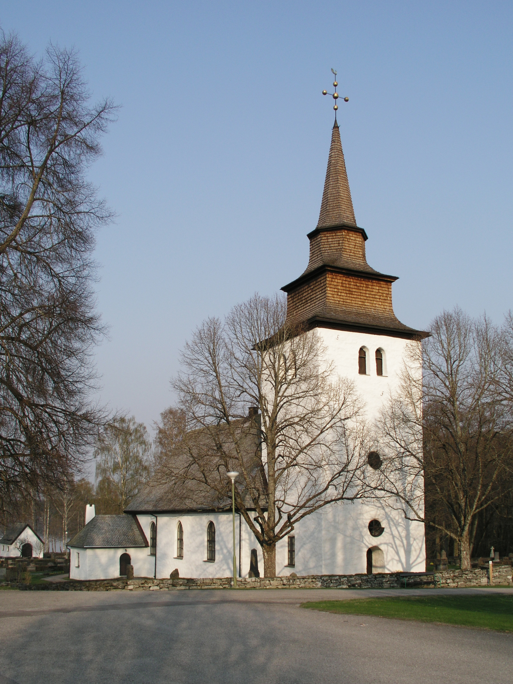 Älgå kyrka / Älgå church. Diocese of Karlstad, Sweden. Arvika.